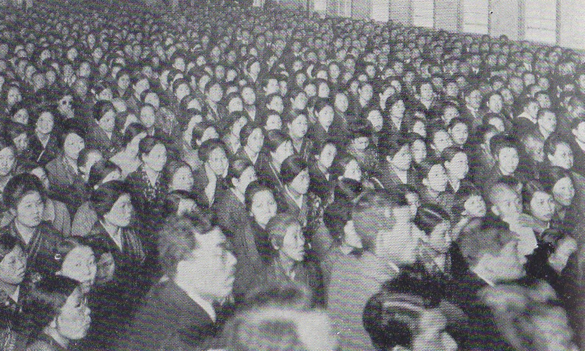 カウマン・ホールでのホーリネスの集会